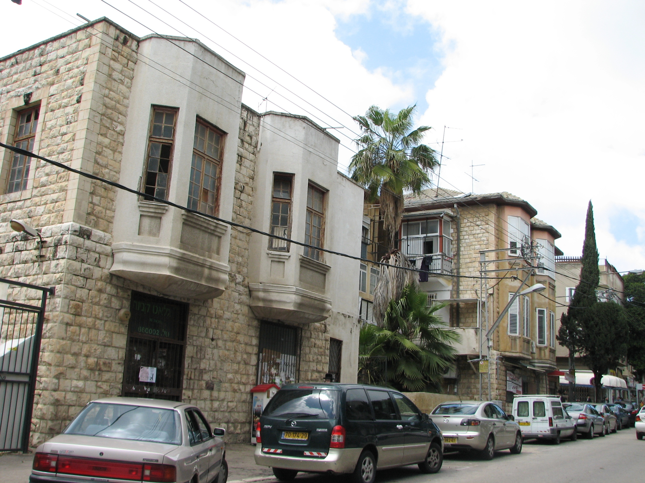 IQuarter Eeast Hadar in Hadar Hacarmel, Haifa Israel רובע הדר מזרח חלק מאזור הדר הכרמל בחיפה. רובע מזרח הדר כולל את השכונות "גאולה, שבתחומה נכללות השכונות ההיסטוריות "נחלה" וגאולה, רמת ויזניץ ואזור יל"ג הכולל את השכונה ההיסטורית "נחלת יהודה" בתים ברחוב מיכאל מבט צפונה צולם בקרבת חיבורו עם רחוב בר כוכבא